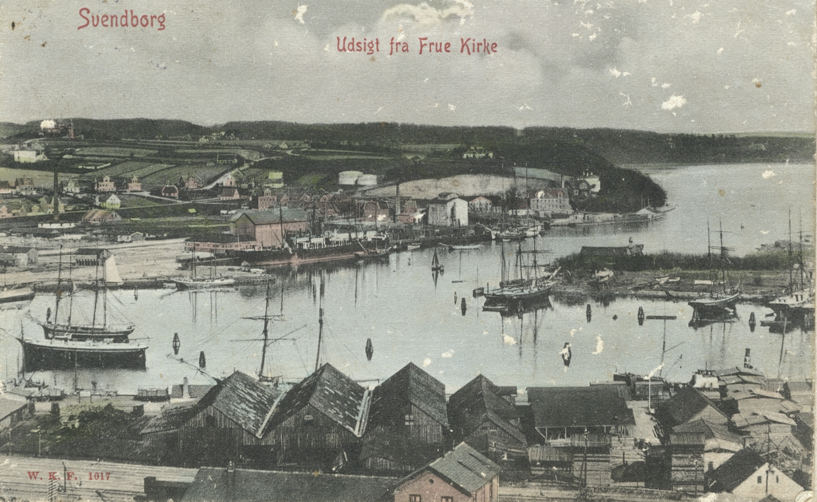 Svendborg set fra Frue Kirkes tårn